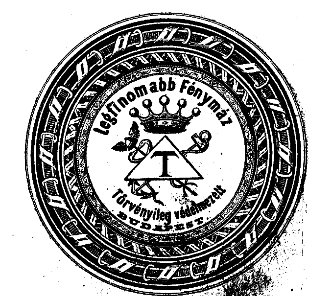 "Topits József fia" gyár fénymáz-csomagolásának címlapja